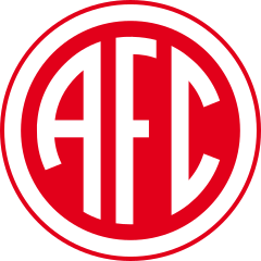 Escudo